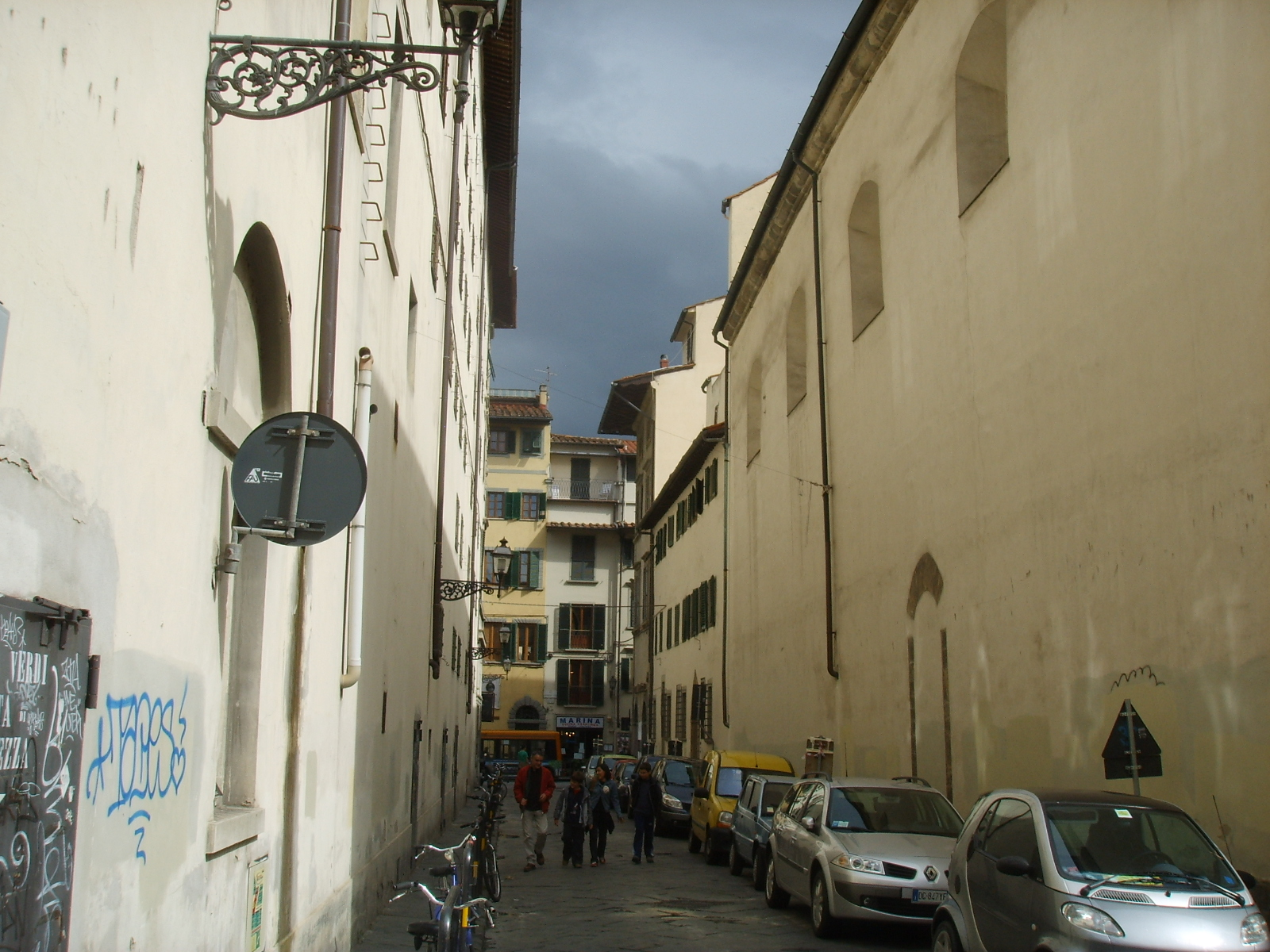 Via dei lavatoi